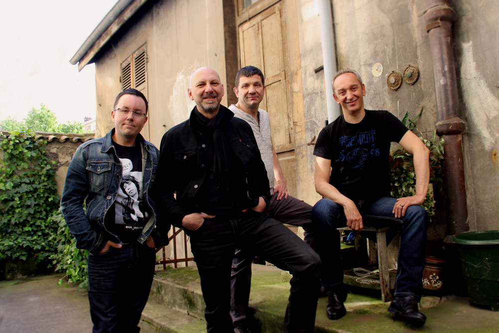 Groupe de rock lyonnais